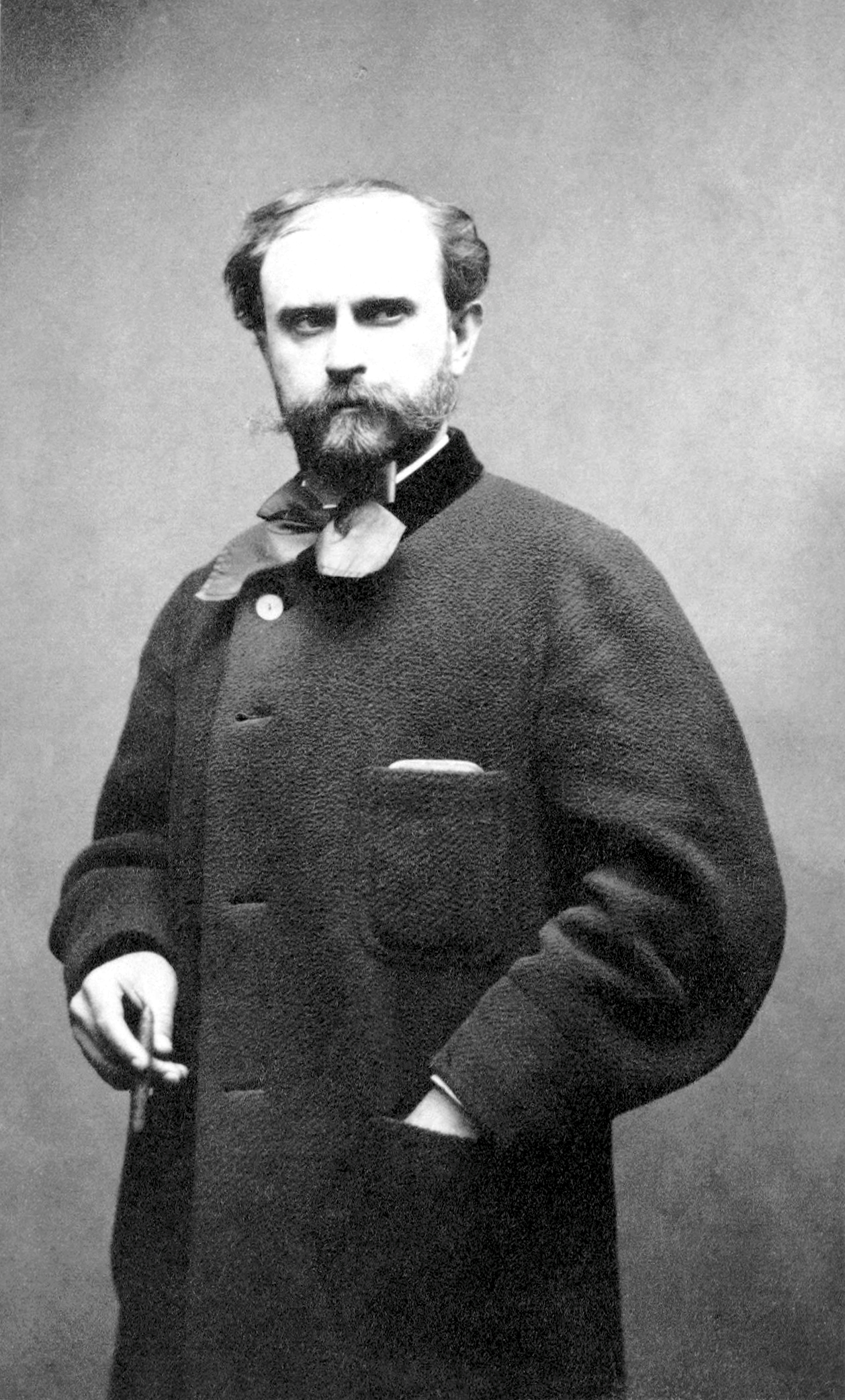 Ernest Reyer (1823–1909), French opera composer and music critic.